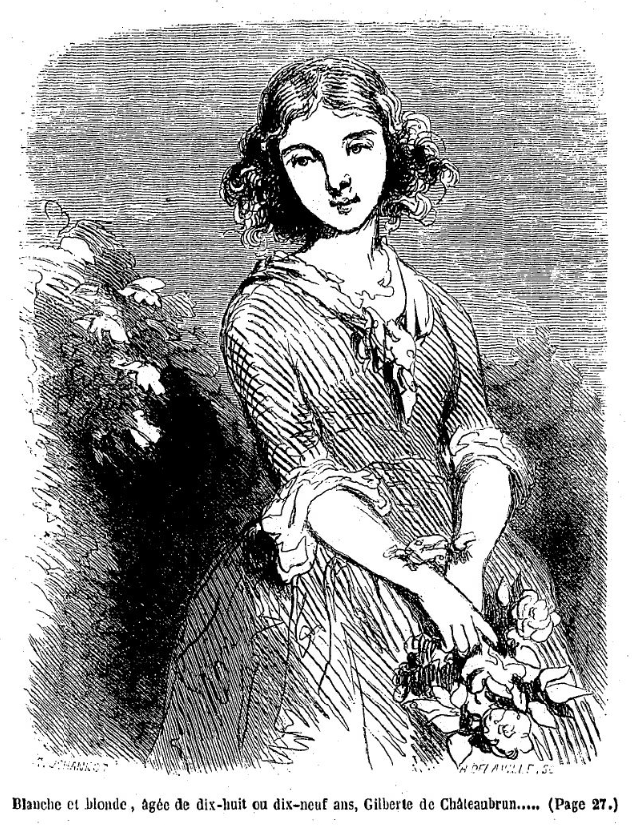 Illustrations de Tony Johannot gravées par H. Delaville pour le roman "Le Péché de Monsieur Antoine" de George Sand, dans sa réédition incluse dans les "Œuvres illustrées de George Sand" parues à Paris chez Hetzel, volume 2, 1852. ("Le Péché de Monsieur Antoine" est le troisième roman dans le volume 2. Attention : dans les volumes des "Œuvres illustrées de George Sand", la pagination recommence à 1 au début de chaque texte inclus dans un volume.)